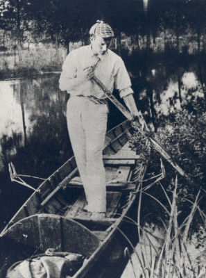 Sidney Paget wearing his deerstalker cap